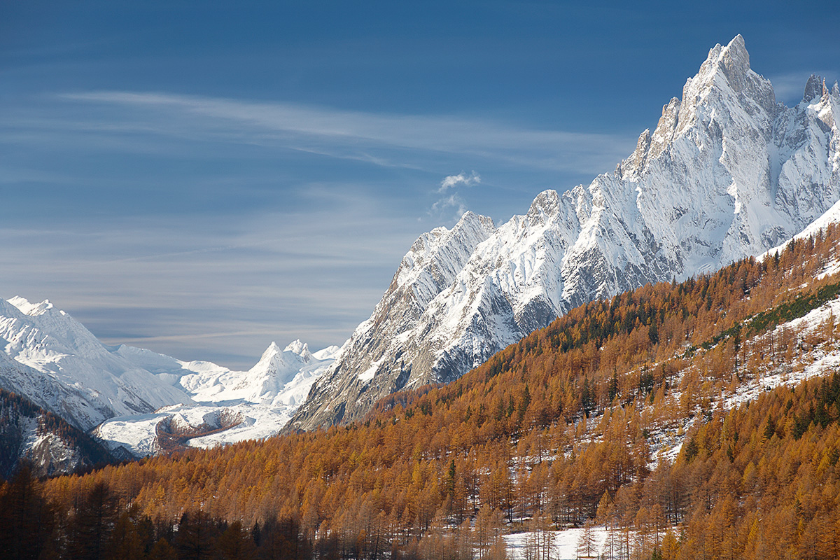 Aiguille Noire de Peuterey, Mont Blanc Massif, Courmayeur, Italy.